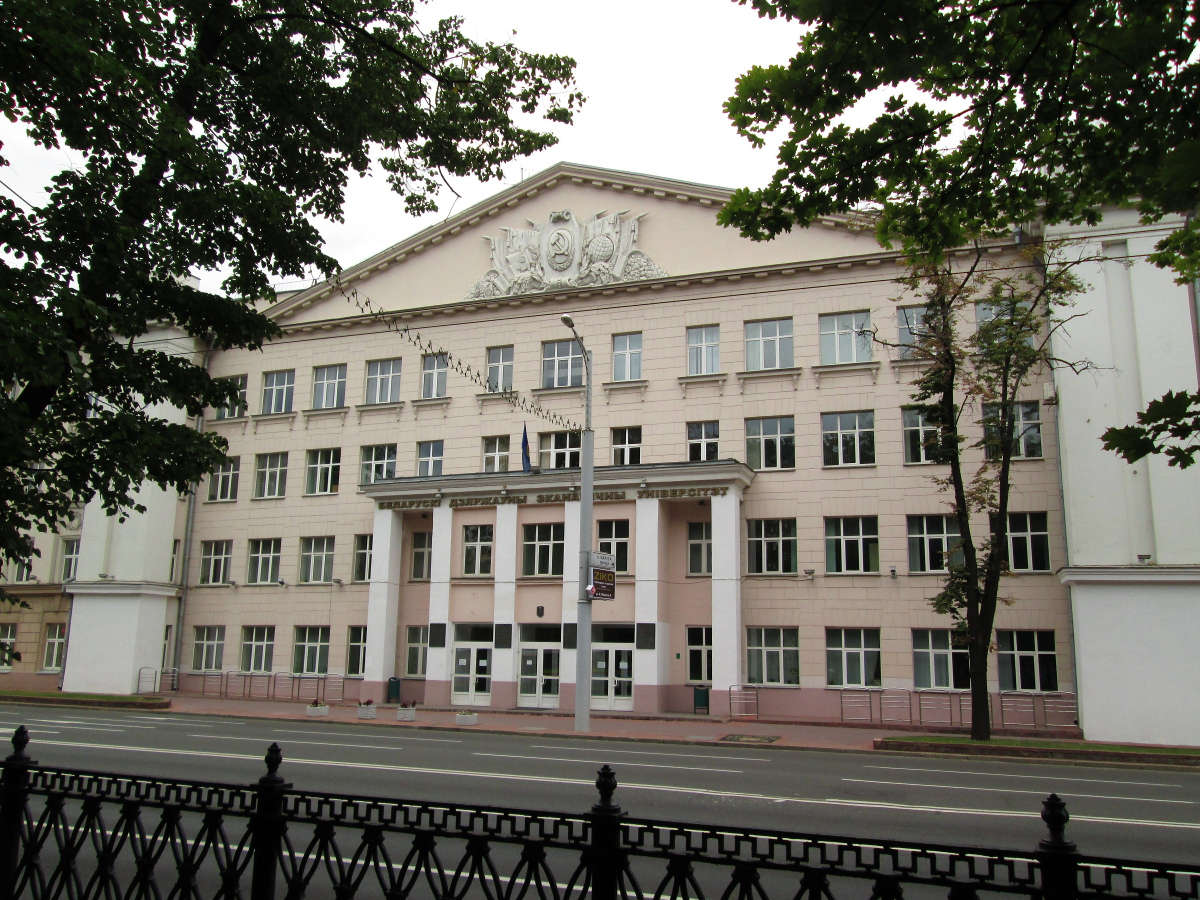 Minsk, Belarus